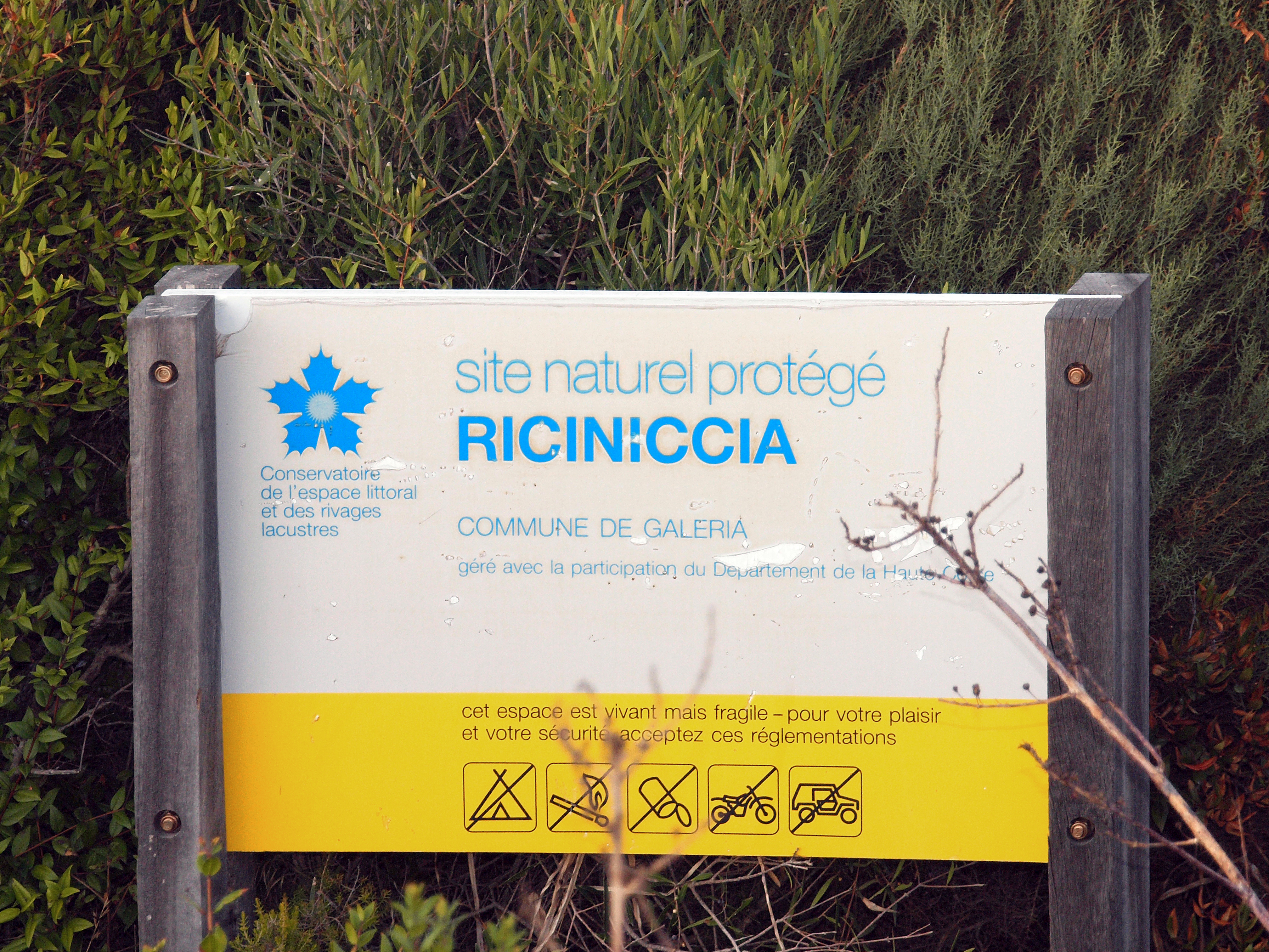 Galeria - Panneau en contrebas de la Tour génoise